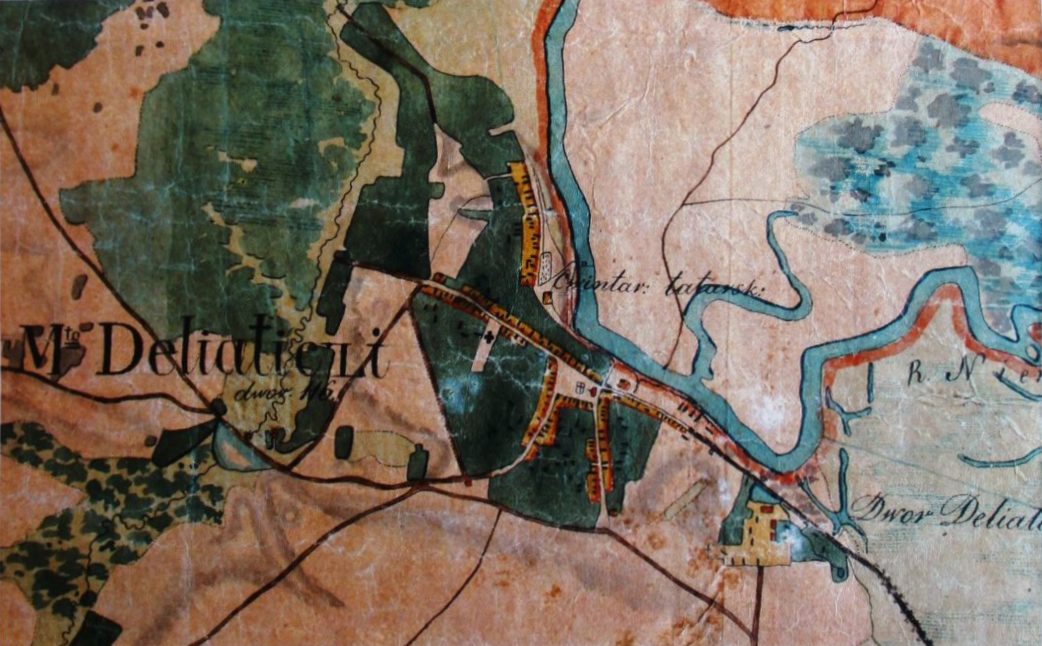 Беларуская (тарашкевіца): Дзяляцічы (Dzialacičy). Плян мястэчка